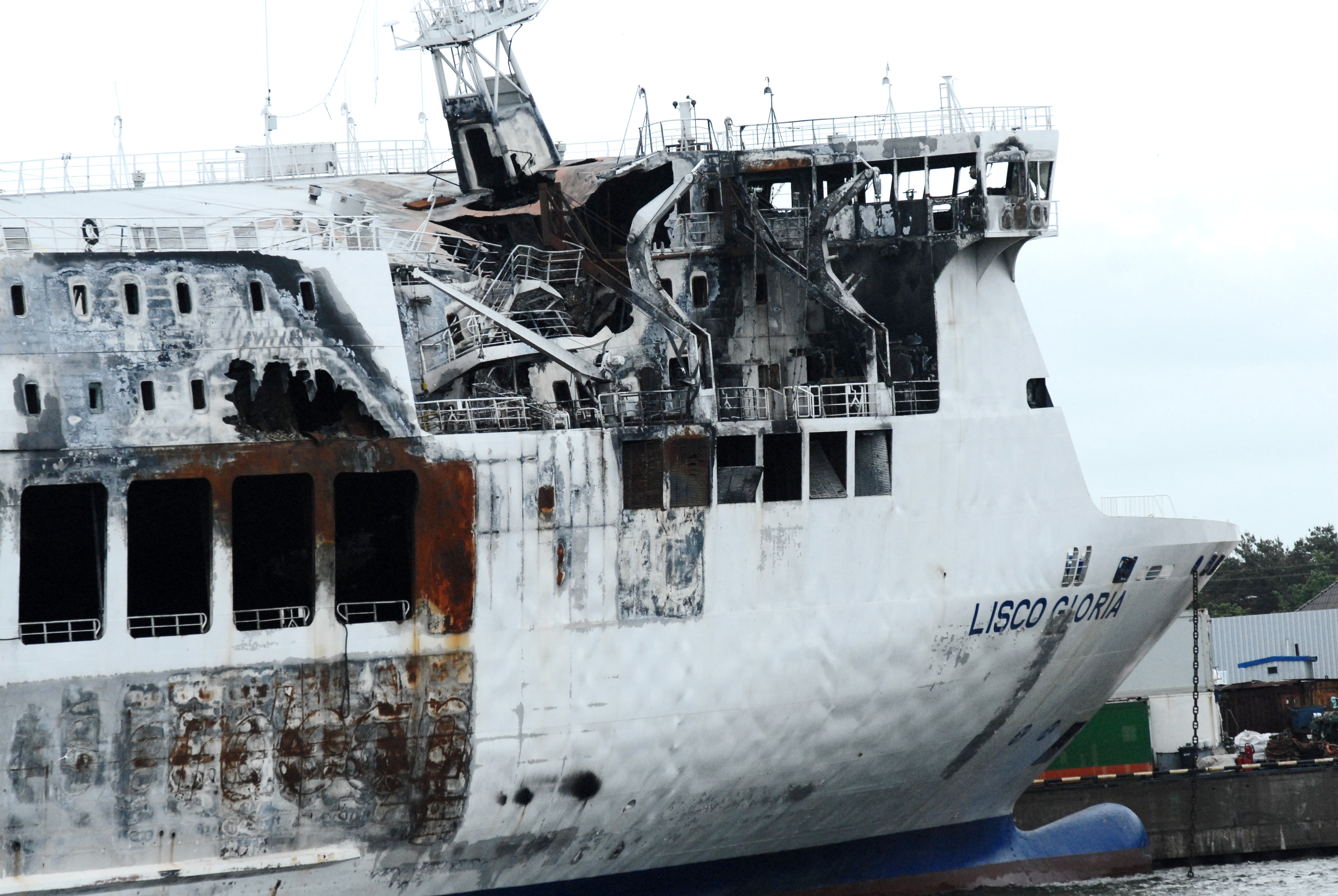 Trajekt LISCO Gloria po požáru